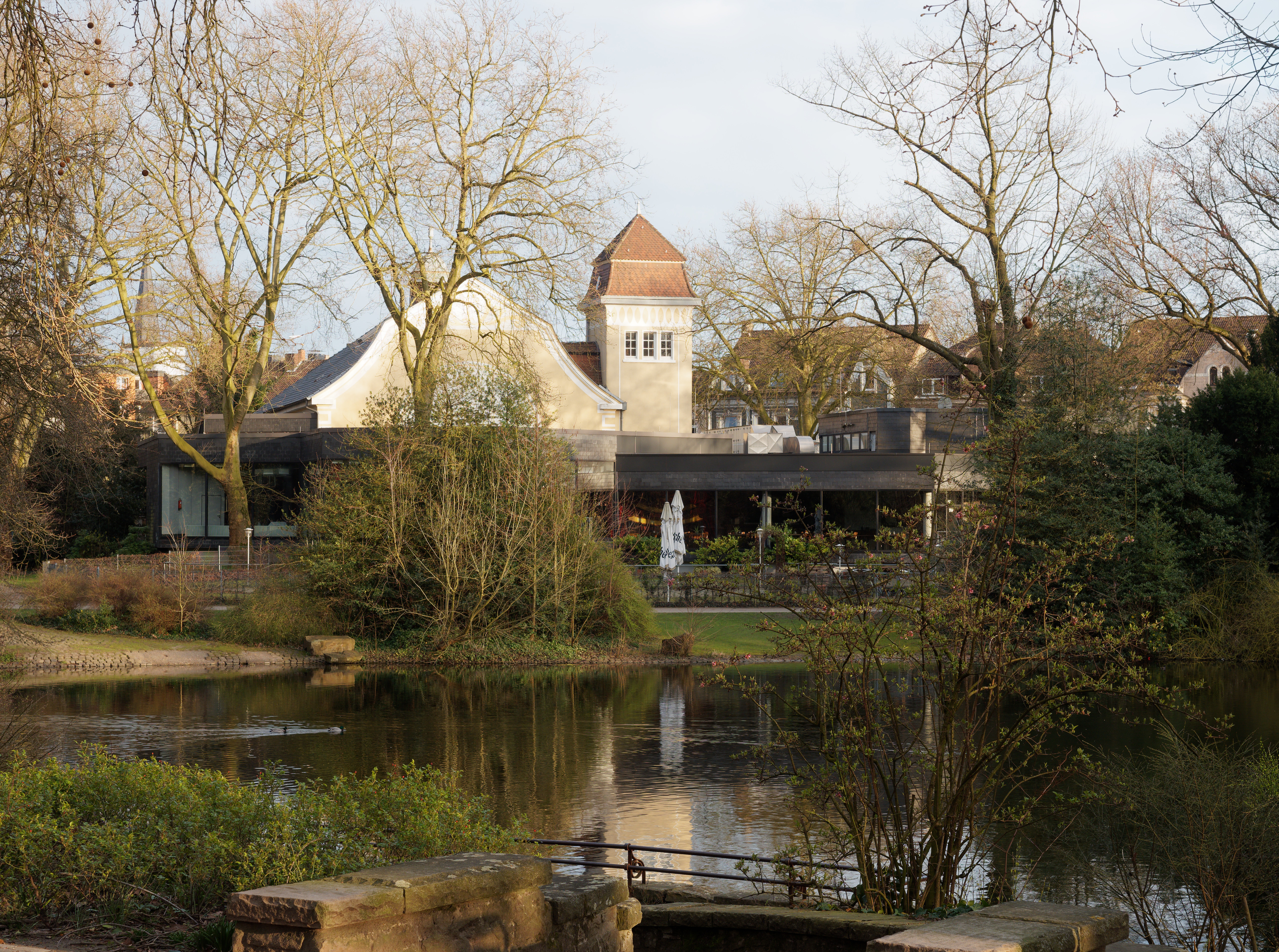 Herne-Wanne, Mondplast Restaurant Palastkantine, Ansicht von der Stadtgartenseite.